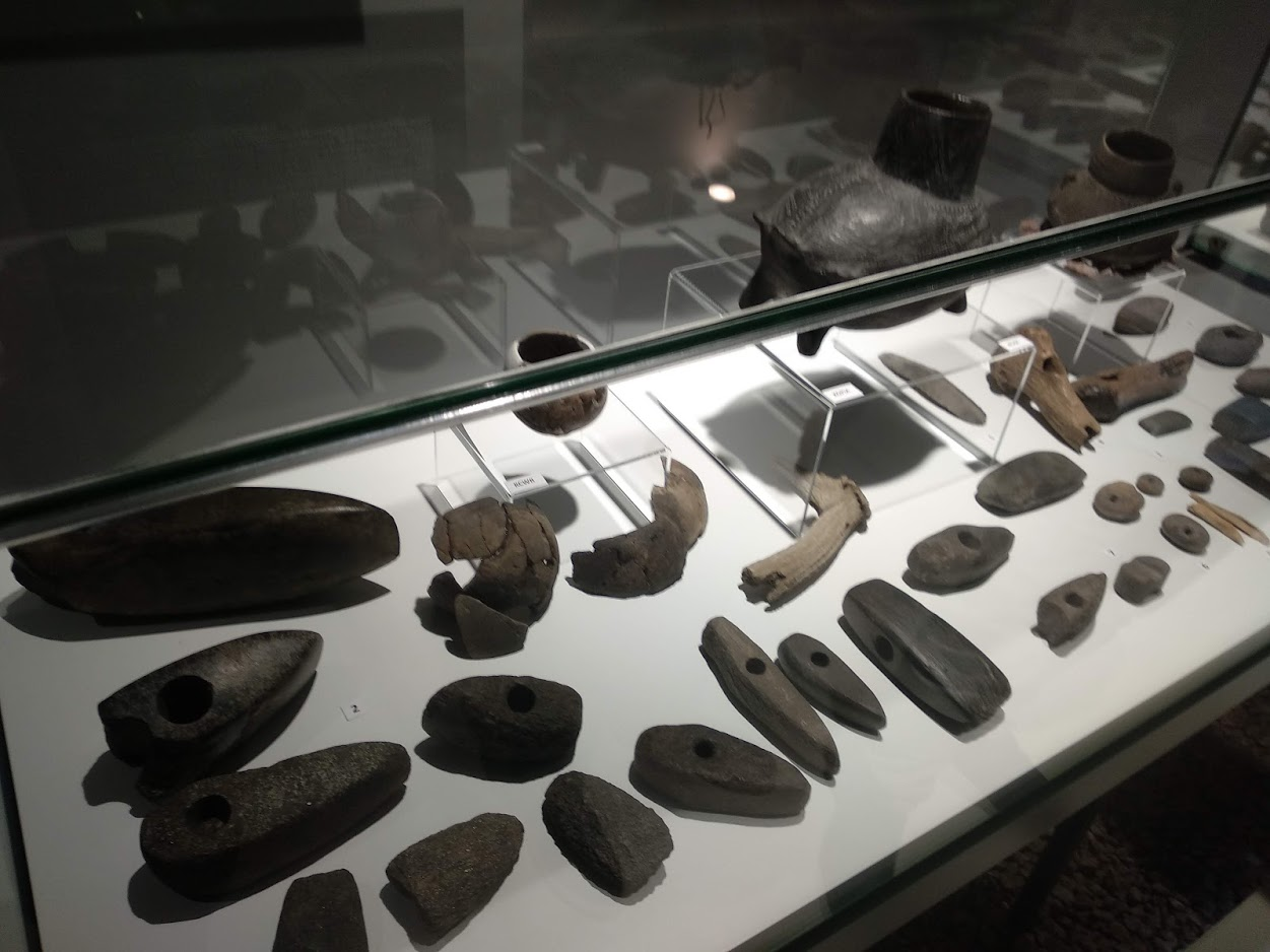 Muzeum Historii Włocławka (2019 r.)